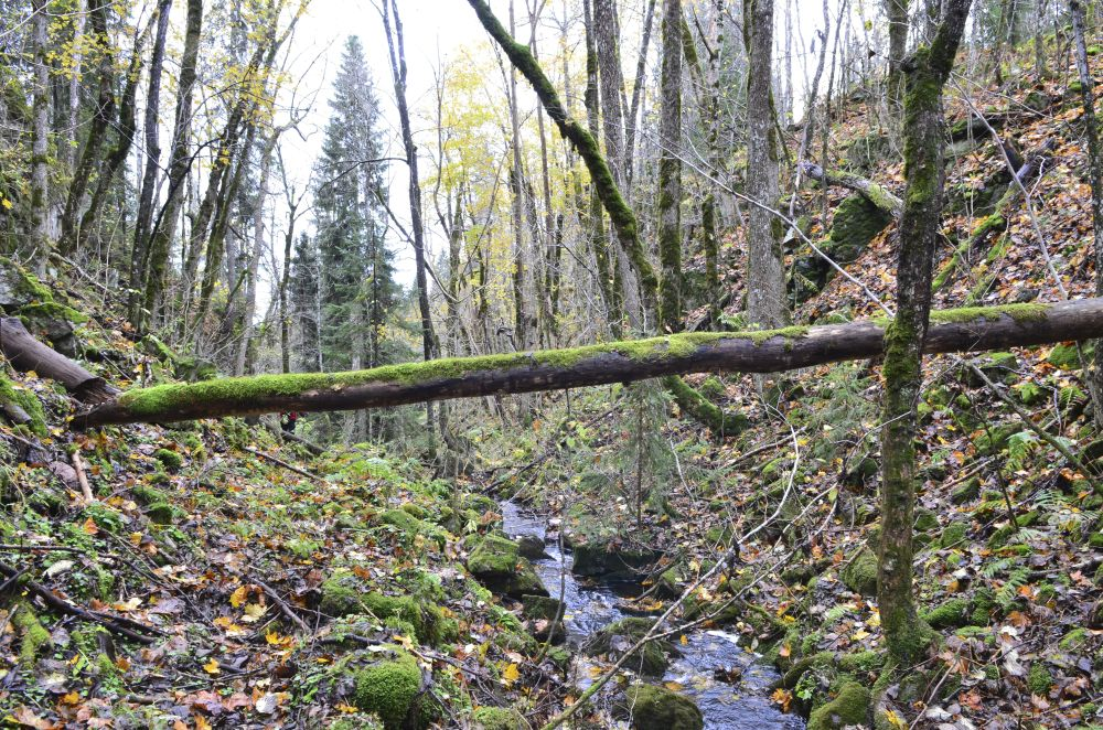 Krøsstjernåsen ligger bortgjemt i en dalbunn, og har fått være i fred for menneskers aktivitet.